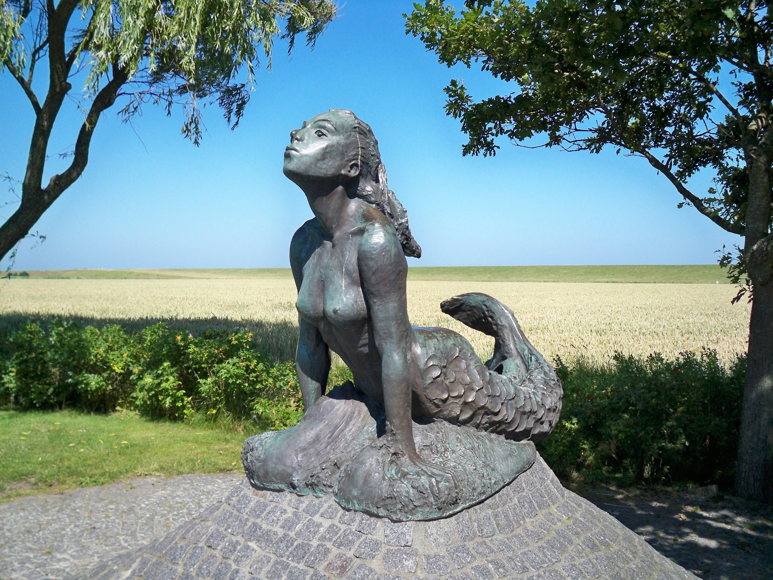 Dat Minsener Seewief am Norderaltendeich